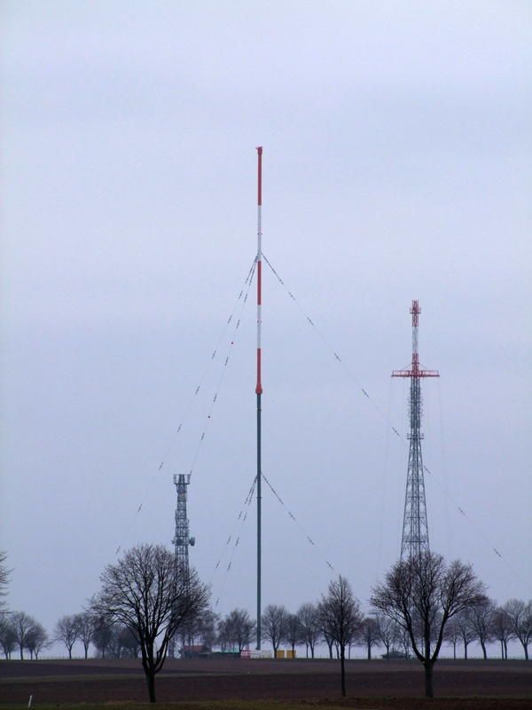 Rheinsender